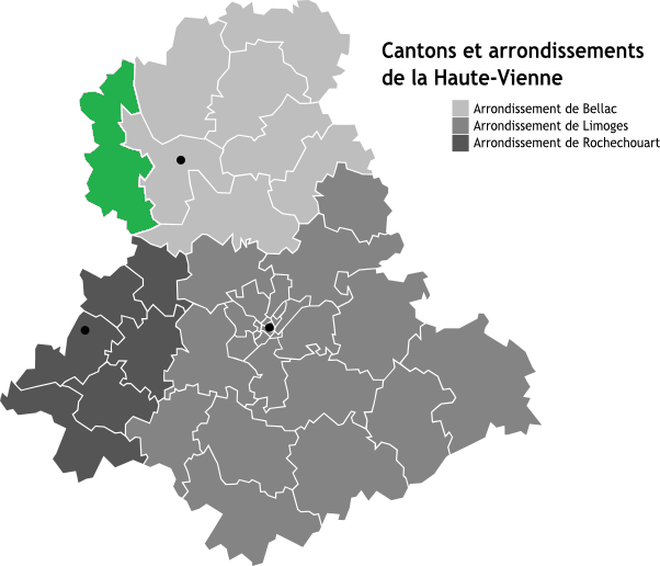 Canton de Mézières-sur-Issoire, Limousin, France en Carte des arrondissements de la Haute-Vienne